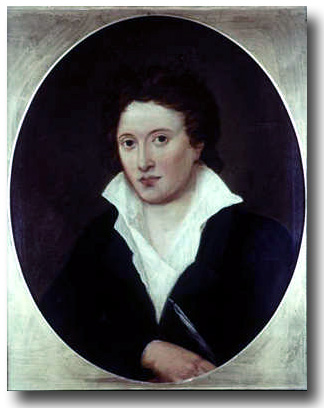 პერსი ბიში შელი